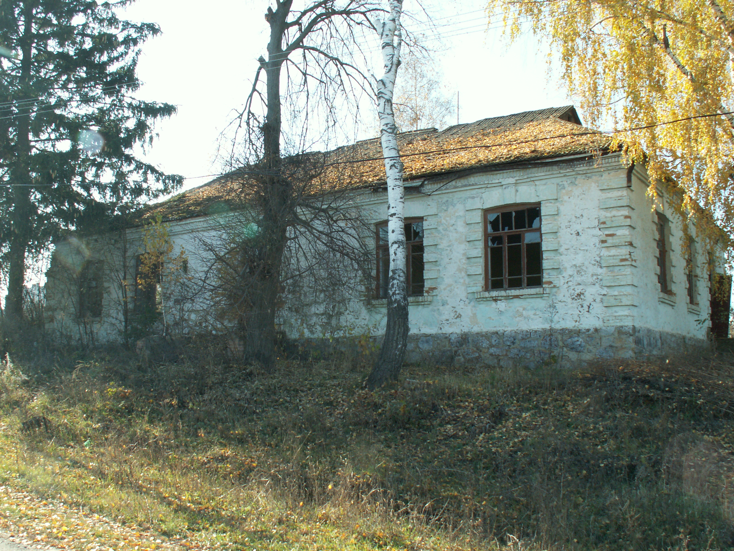 Будинок колишньої школи, побудованої місцевими старовірами у 1924 р.